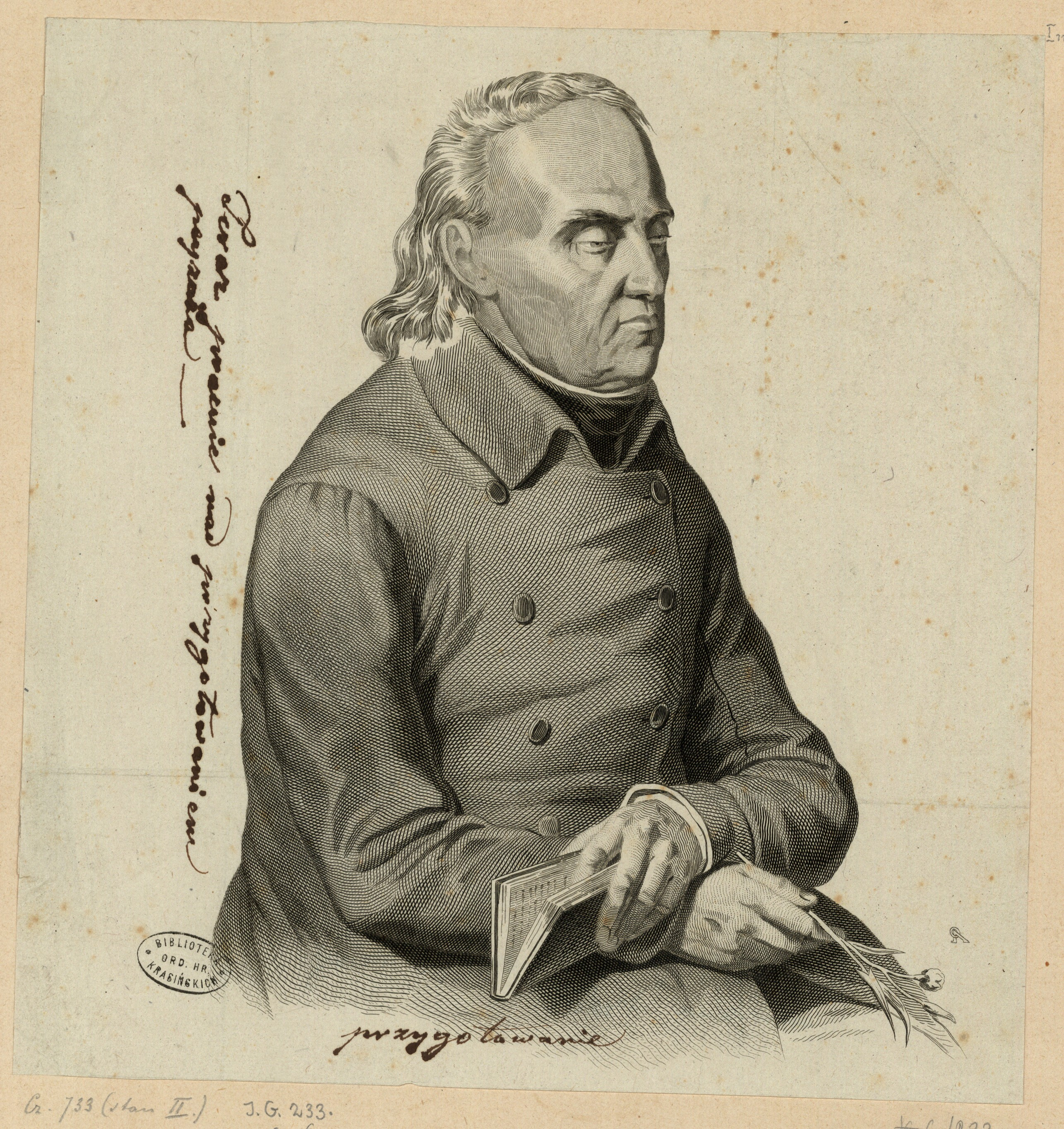 Беларуская (тарашкевіца): Партрэт Станіслава Юндзіла (Stanisłaŭ Jundził)